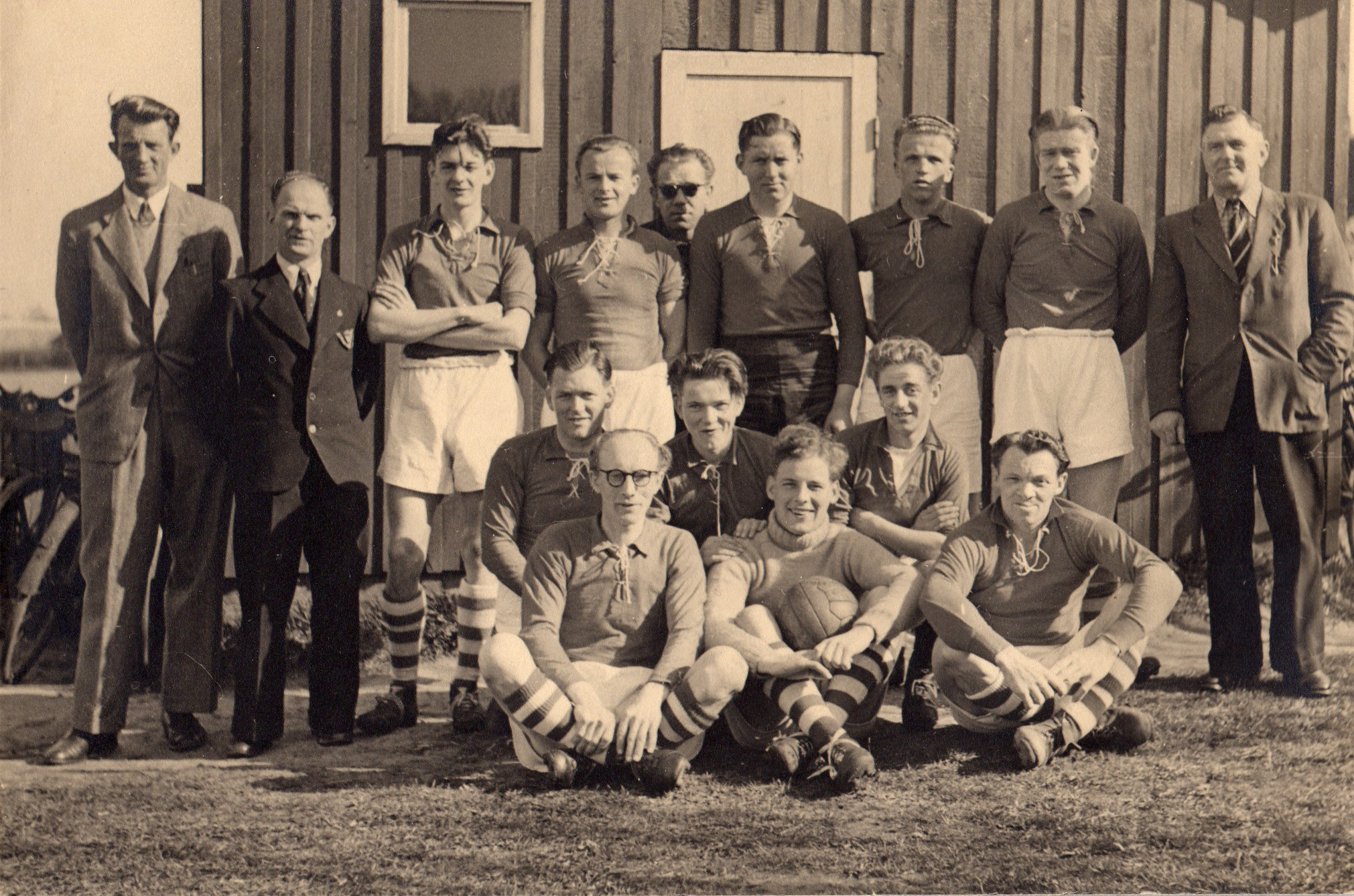 Foto af Boldklubben Cimbrias førstehold årgang 1949-1950 Bagest fra Venstre: Andrev Verdier (holdleder og formand for matchkommiteen), Henning Pedersen, Jørgen Christensen, Martin Mørk, bagved Tommas Frisk, Ludvig Hansen, reserve, Leif Berthelsen, Kuno Frisk, Ingemann Pedersen, holdleder, Gunnar Petersen, Gerhardt Hougaard, reserve, Viggo Jørgensen, Ingolf Johansen, Svend Aage Jespersen, Holger Mikkelsen Billedet er bestilt af bestyrelsen til offentliggørelse, her repræsenteret af Sekretær Svend Aage Jespersen